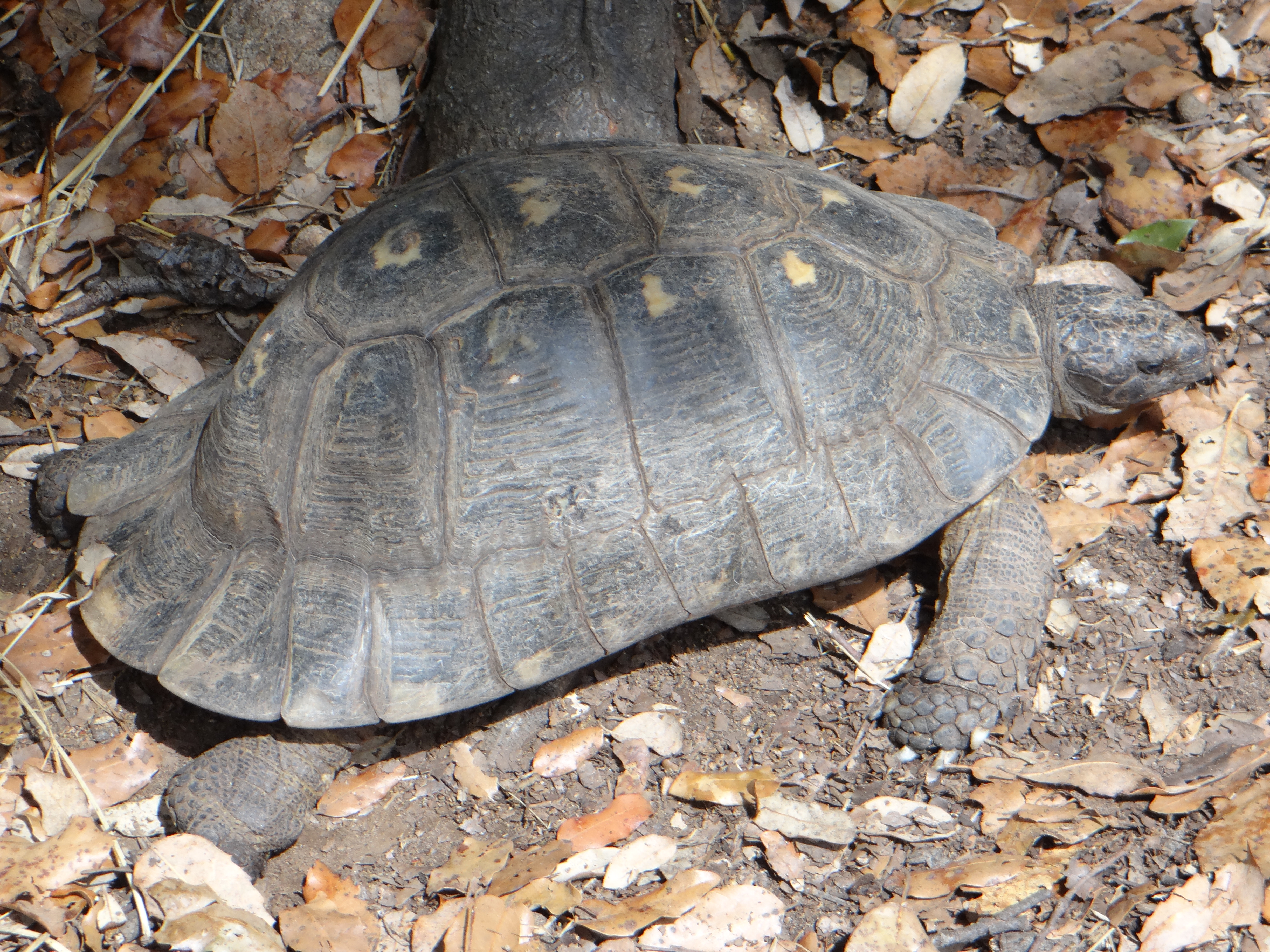 Tortue bordée (Testudo marginata) au parc A Cupulatta, Corse